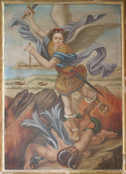 Арханёл Міхал. Пачатак XХ ст., в. Белагруда Лідскага р-на